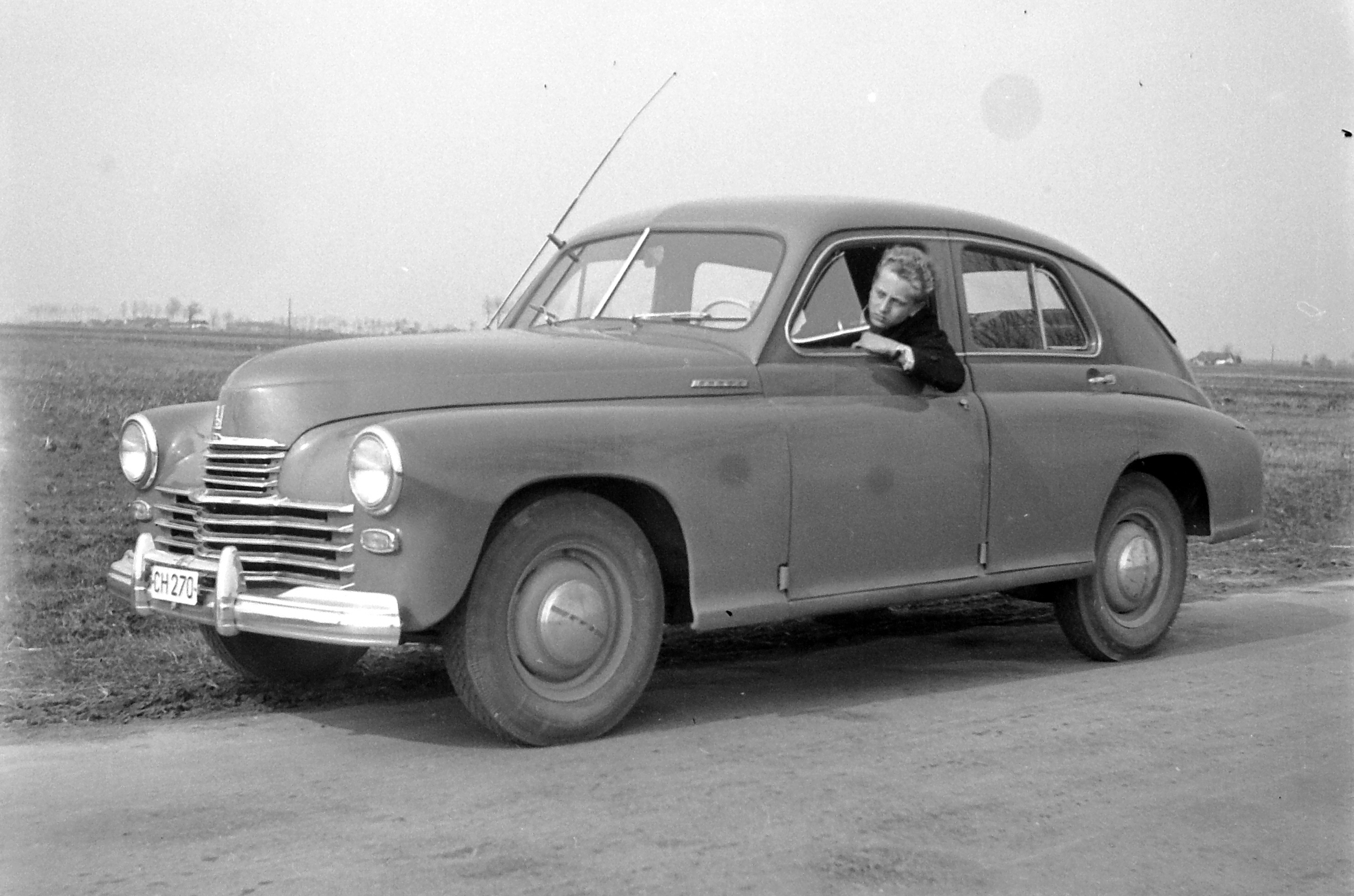 GAZ M 20 Pobjeda típusú személygépkocsi. Tags: automobile, Soviet brand, GAZ-brand, transport, M20 Pobieda, chauffeur, number plate Title: GAZ M 20 Pobjeda típusú személygépkocsi.